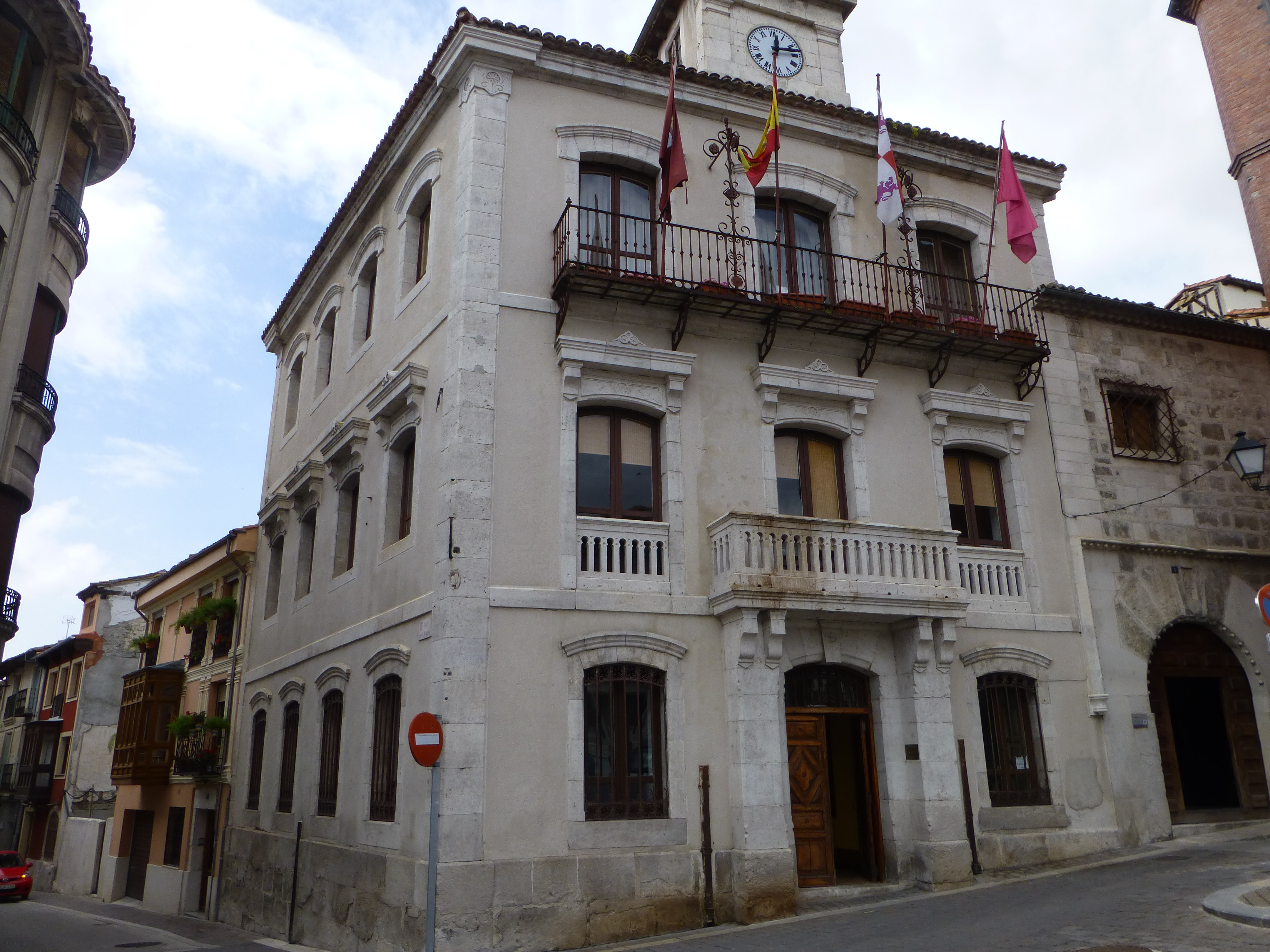 Ayuntamiento. Fachada. Cuéllar, Segovia, España.